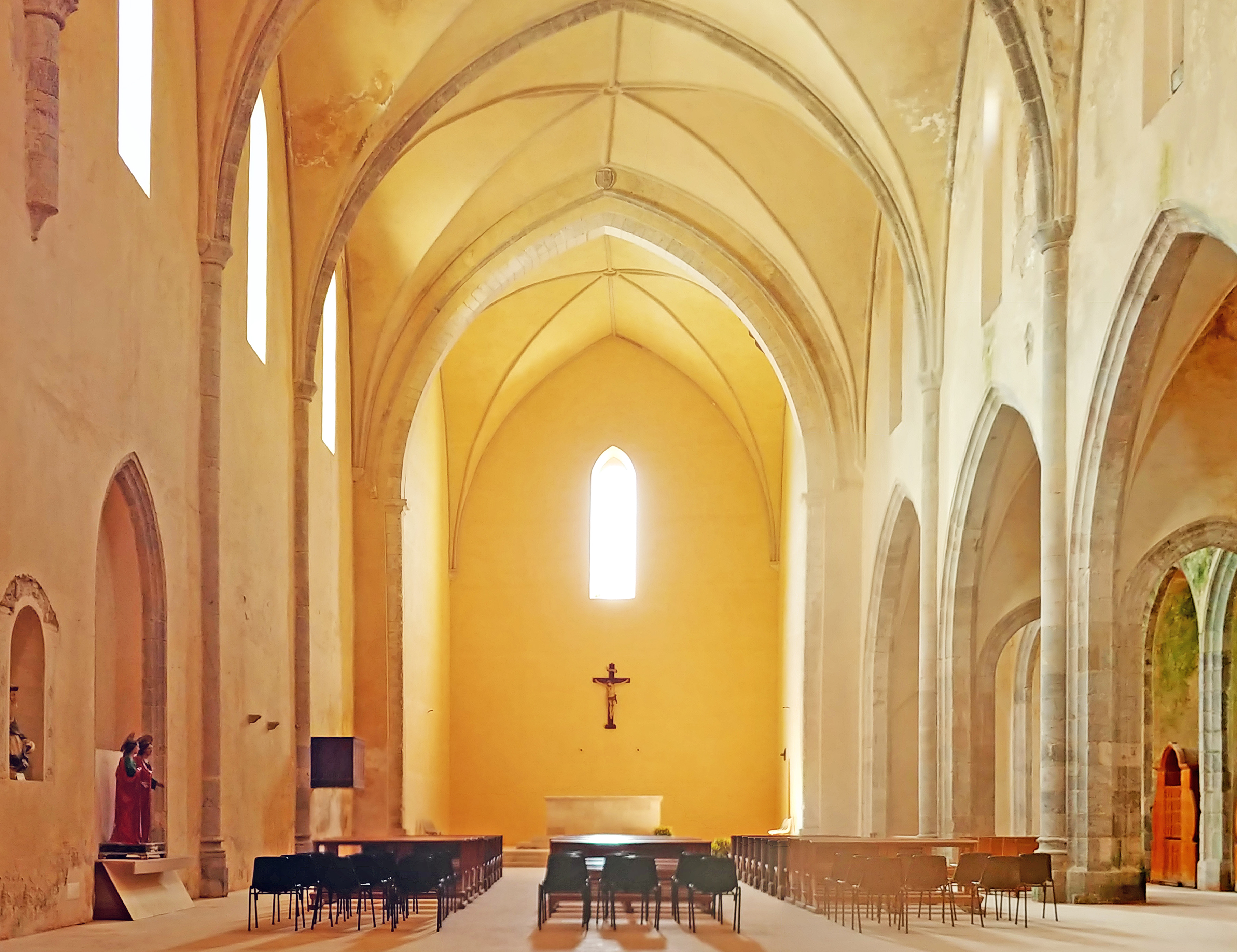 Interno.